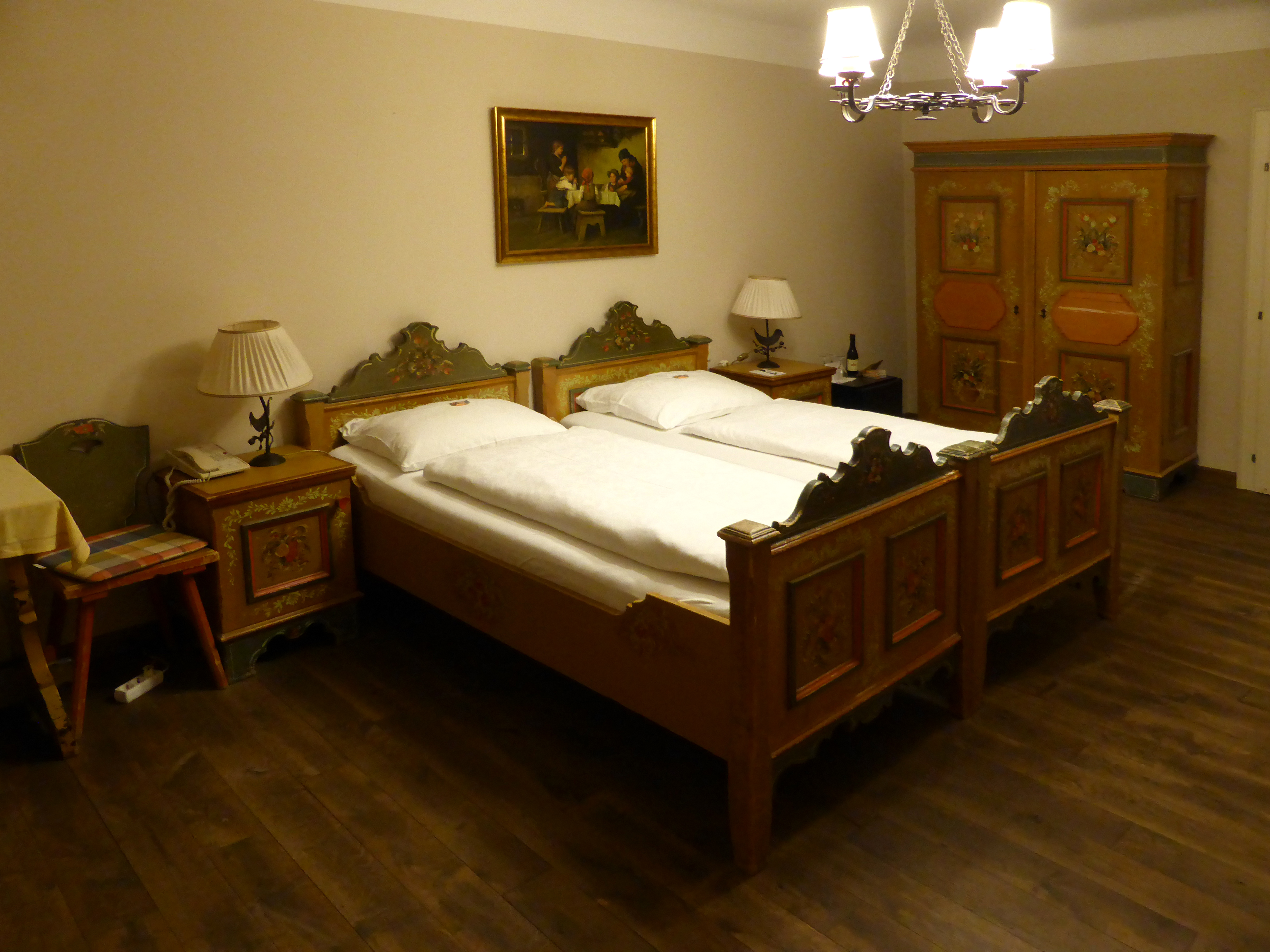 Hotel Kasererbräu, Salzburg, Kaigasse 33. In Zimmer 323 übernachtete Romy Schneider zur Premiere von Sissi – Die junge Kaiserin 1956. Das handbemalte Bett, in dem sie übernachtete, ist heute noch unverändert erhalten.